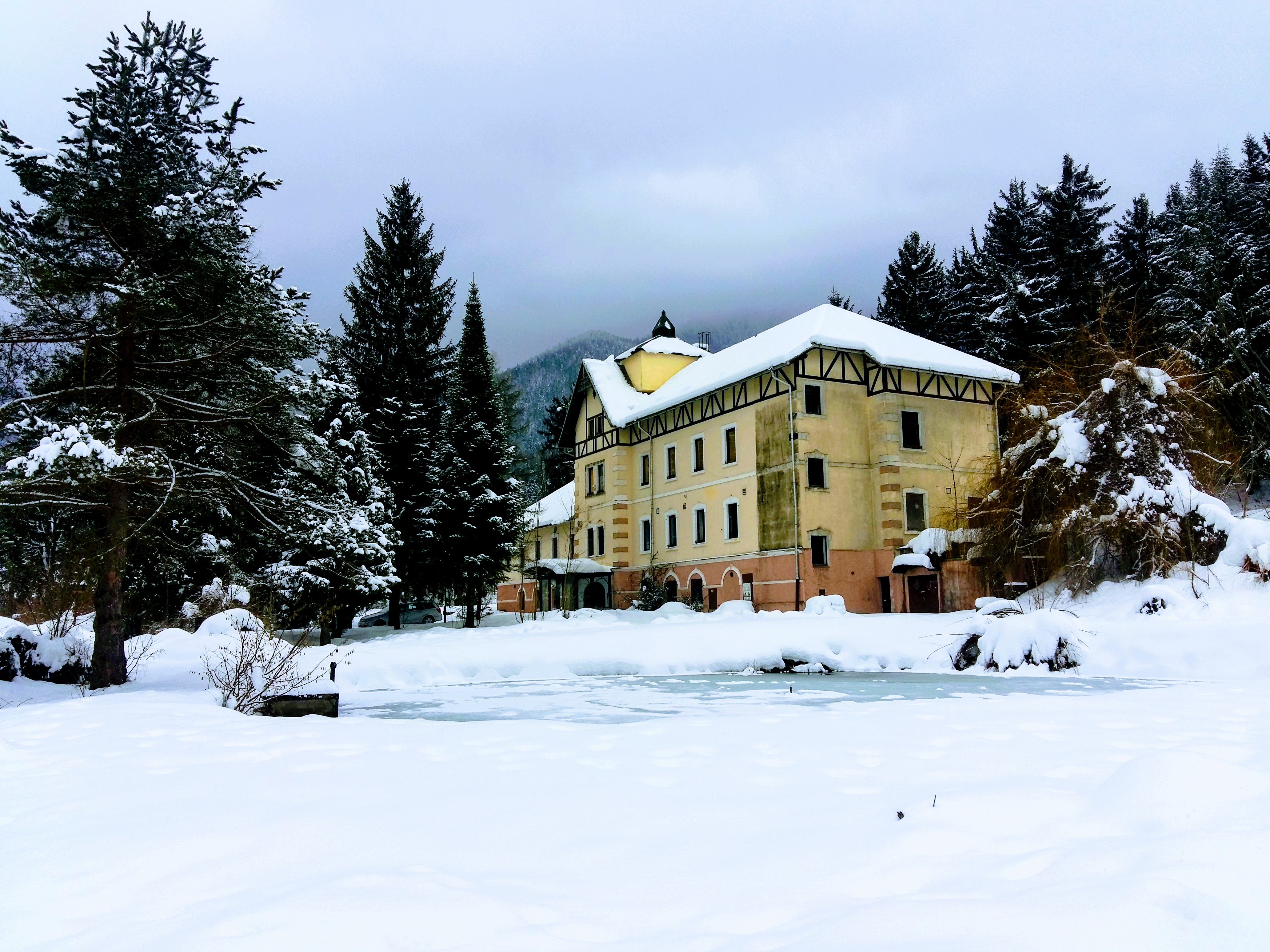 Nekoč dobro obiskan hotel